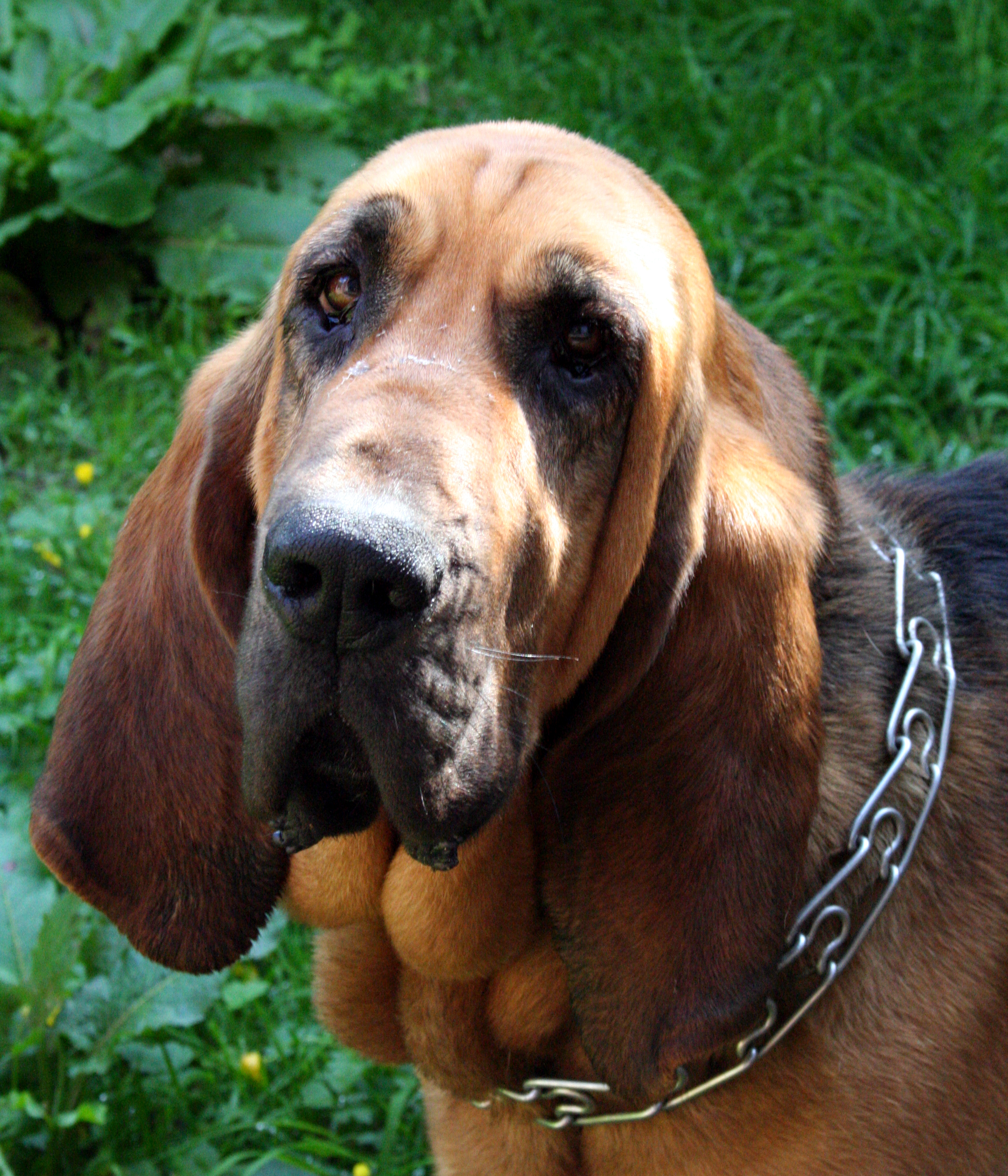 Photo d'un visage d'un chien de Saint-Hubert